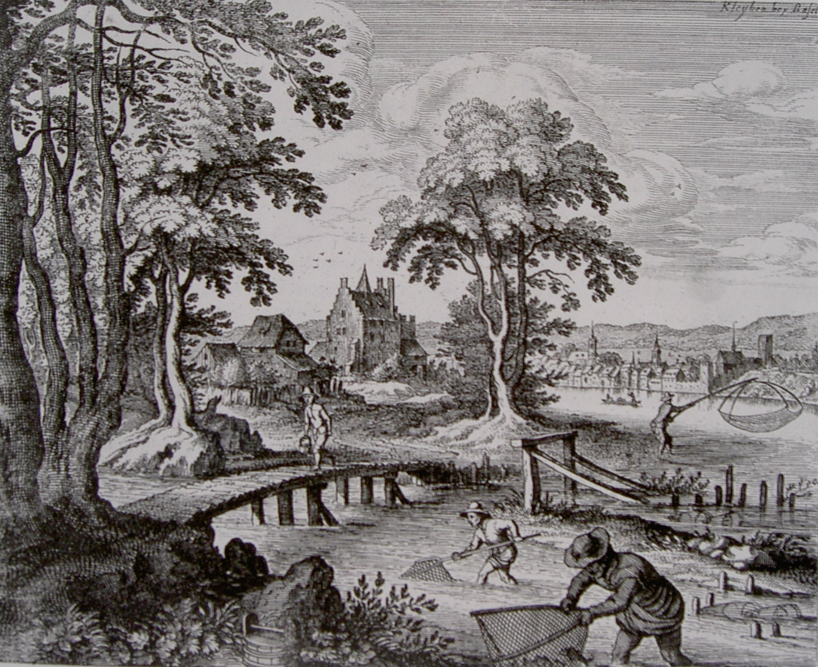 Weiherschloss Klybeck bei Basel im Vordergrund die Wiese